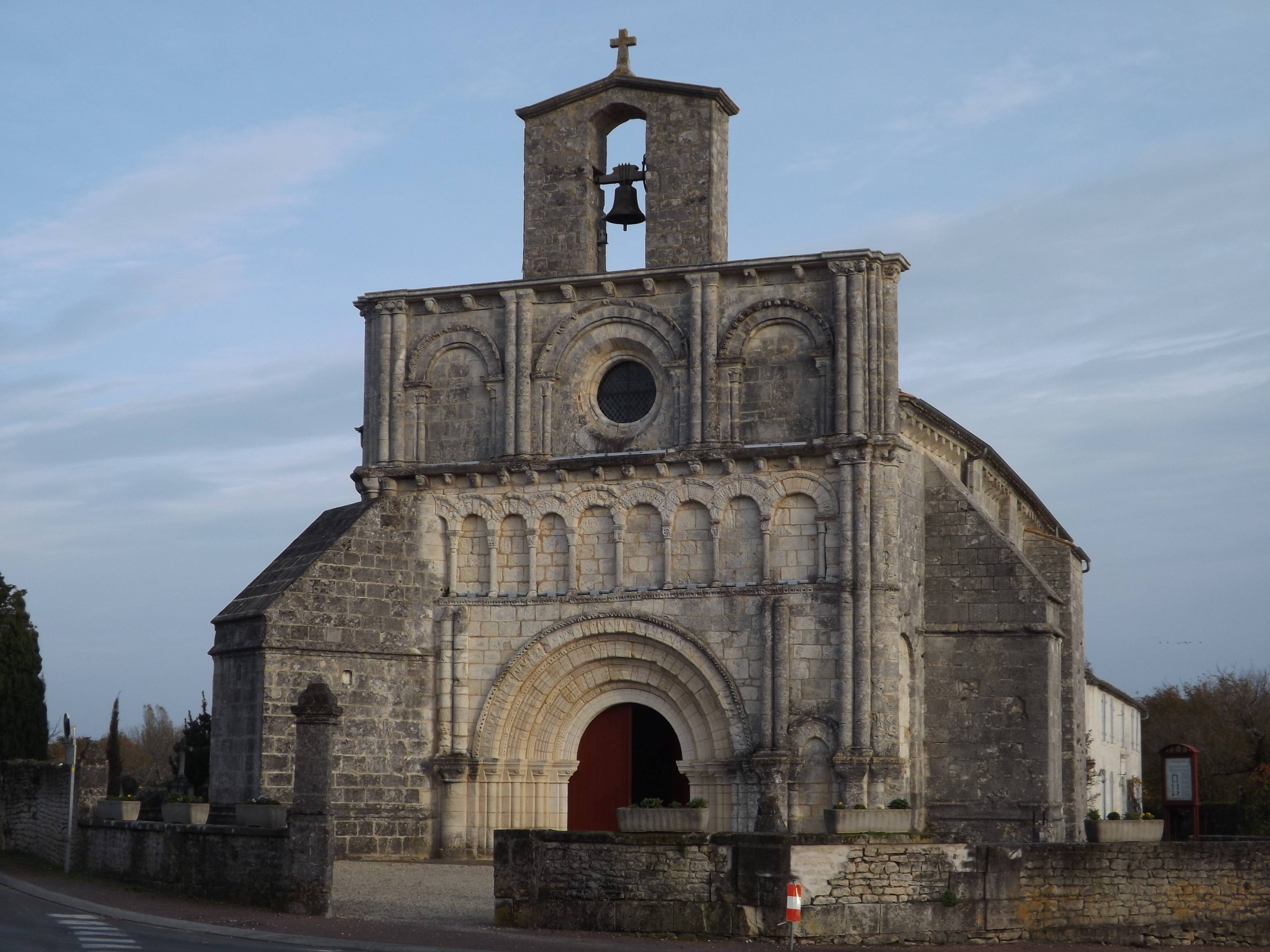 L'église romane de Breuillet en Charente-Maritime